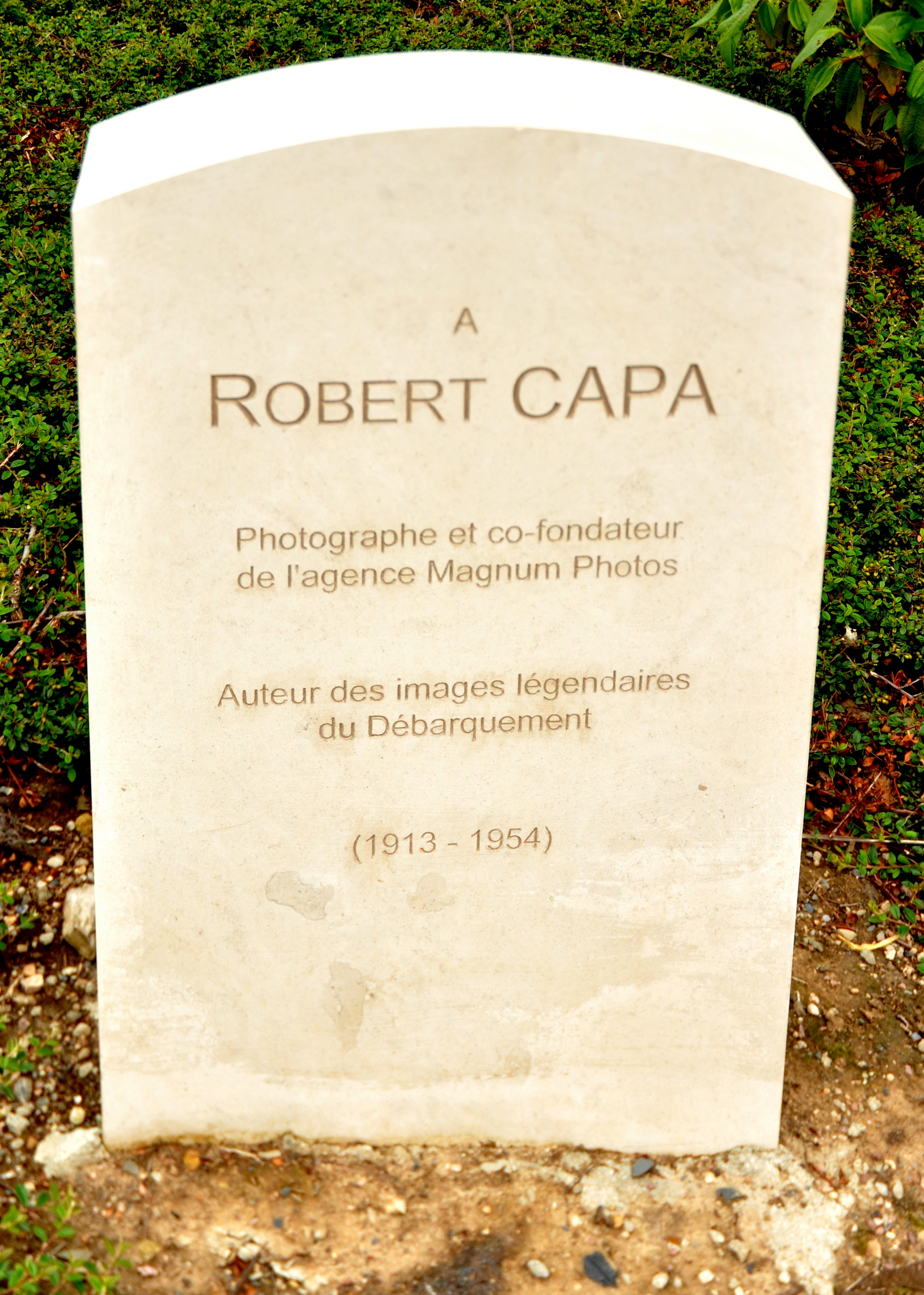 Lápida de Robert Capa en Bayeux (Normandía, Francia)[1] [su tumba está en Amawalk, Yorktown, Nueva York, Estados Unidos][2]